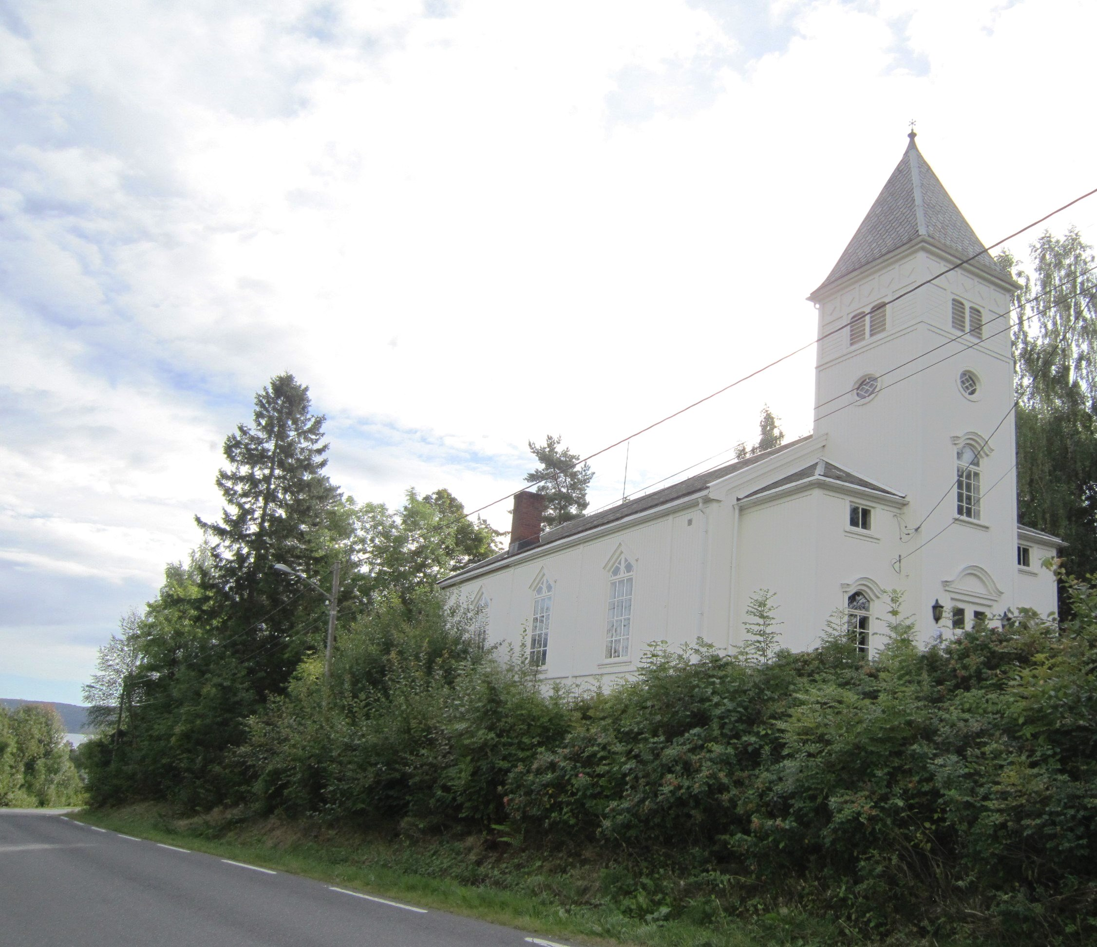 Sundbyveien (fylkesvei 6) nedenfor Nærsnes kirke